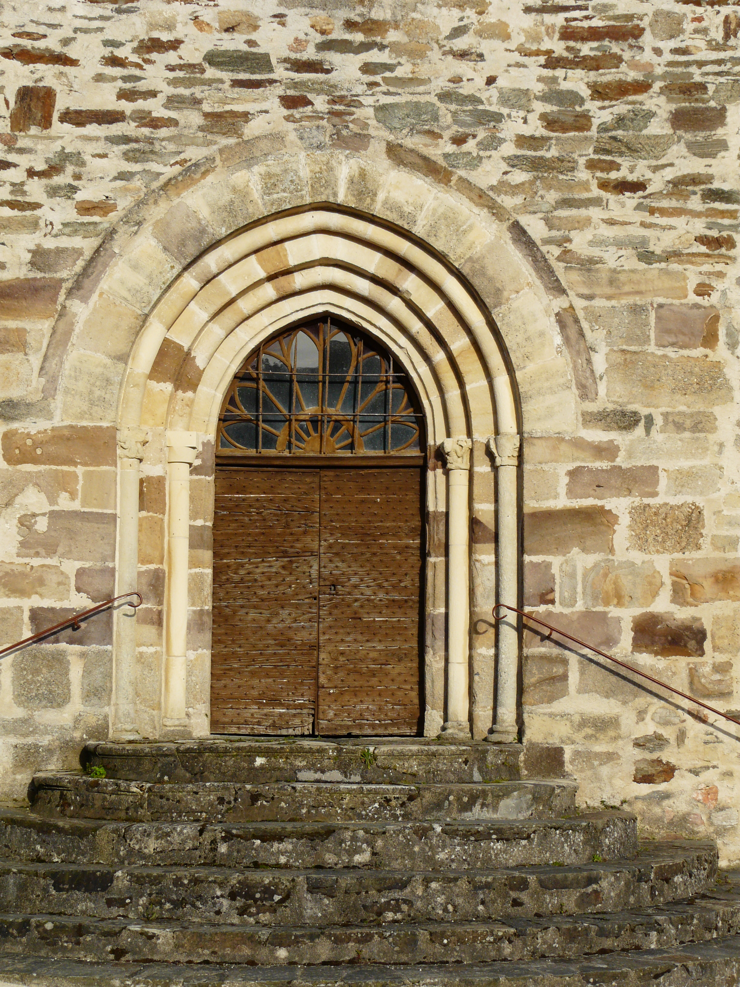 Le portail ouest de l'église Saint-Cyr et Sainte-Juliette, Saint-Cyr-les-Champagnes, Dordogne, France